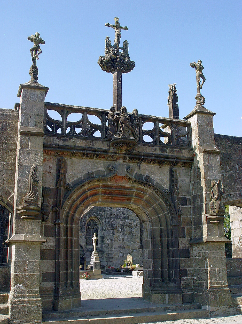 La Martyre (Bretagne, Finistère) Kirche Saint-Salomon: Man betritt den Kirchhof durch ein monumentales Triumphtor das von einem Clavaire überhöht wird. Seitlich eine Darstellung der Verkündigung: Linker Torpfeiler - Maria, am rechten Pfeiler der Erzengel Gabriel.